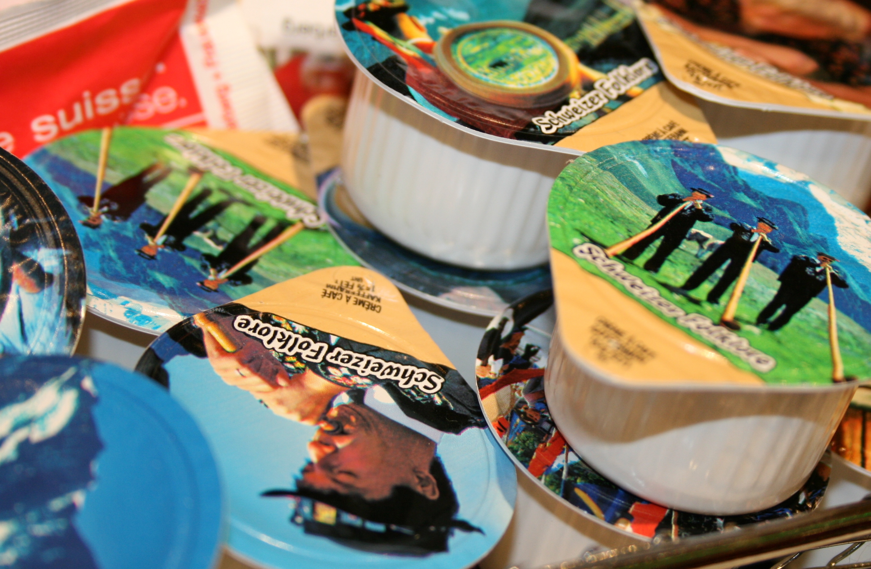 Kaffeerahmdeckeli